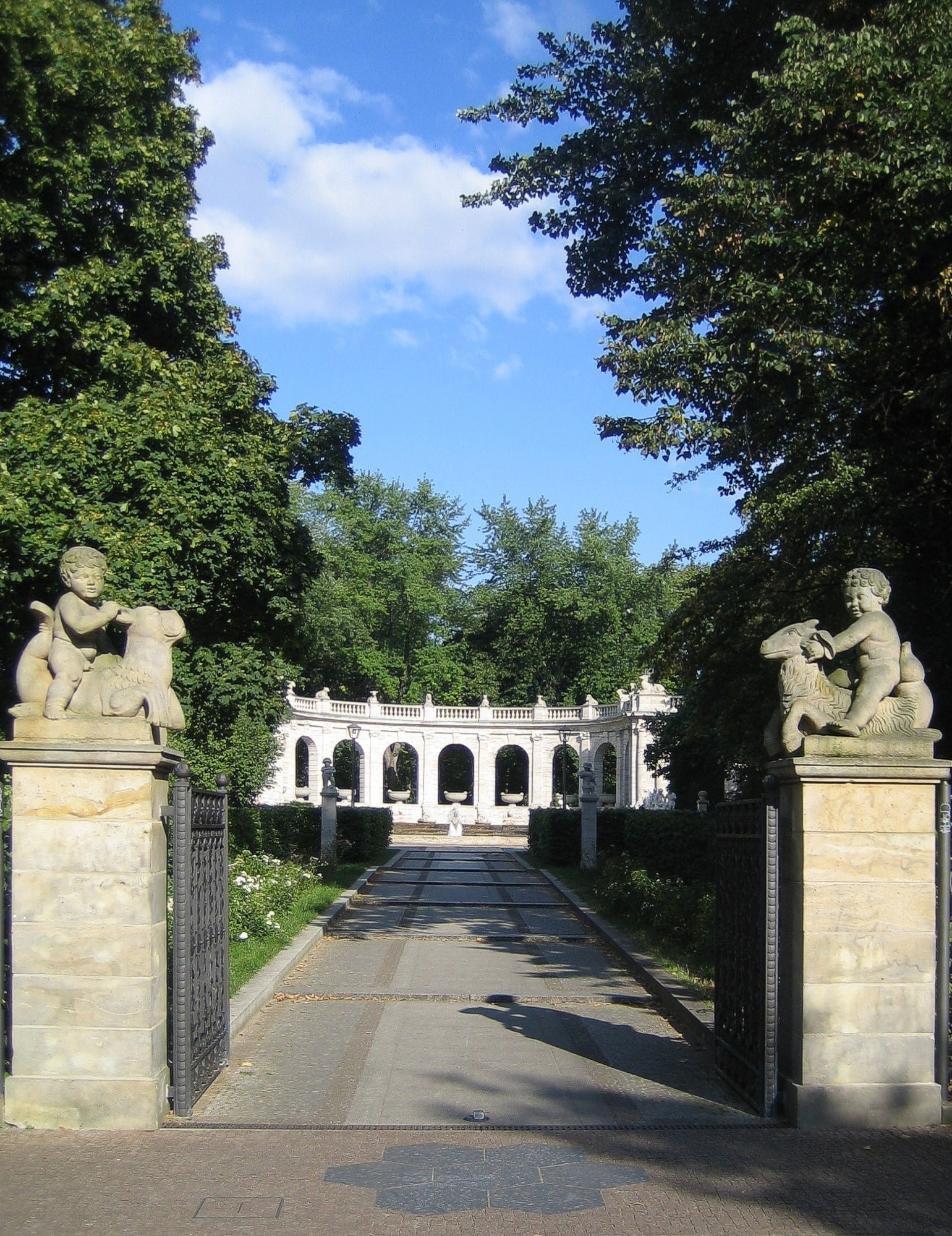 Märchenbrunnen im Berliner Volkspark Friedrichshain. Eingang mit Blick auf die Arkaden.